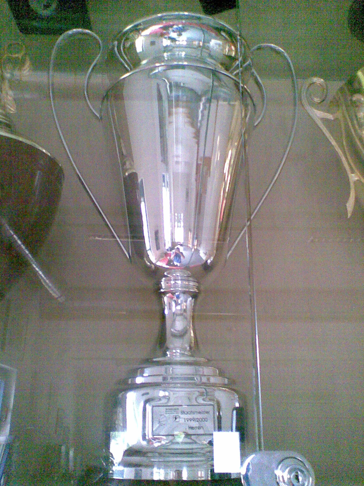 Der Basketball Staatsmeisterpokal aus dem Jahr 1999/00